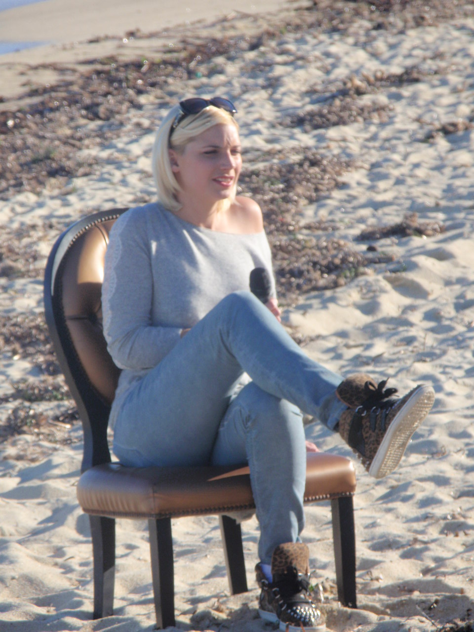 Voici Nadège Lacroix lors d'une interview avant le tournage de Sous le soleil de Saint-Tropez .